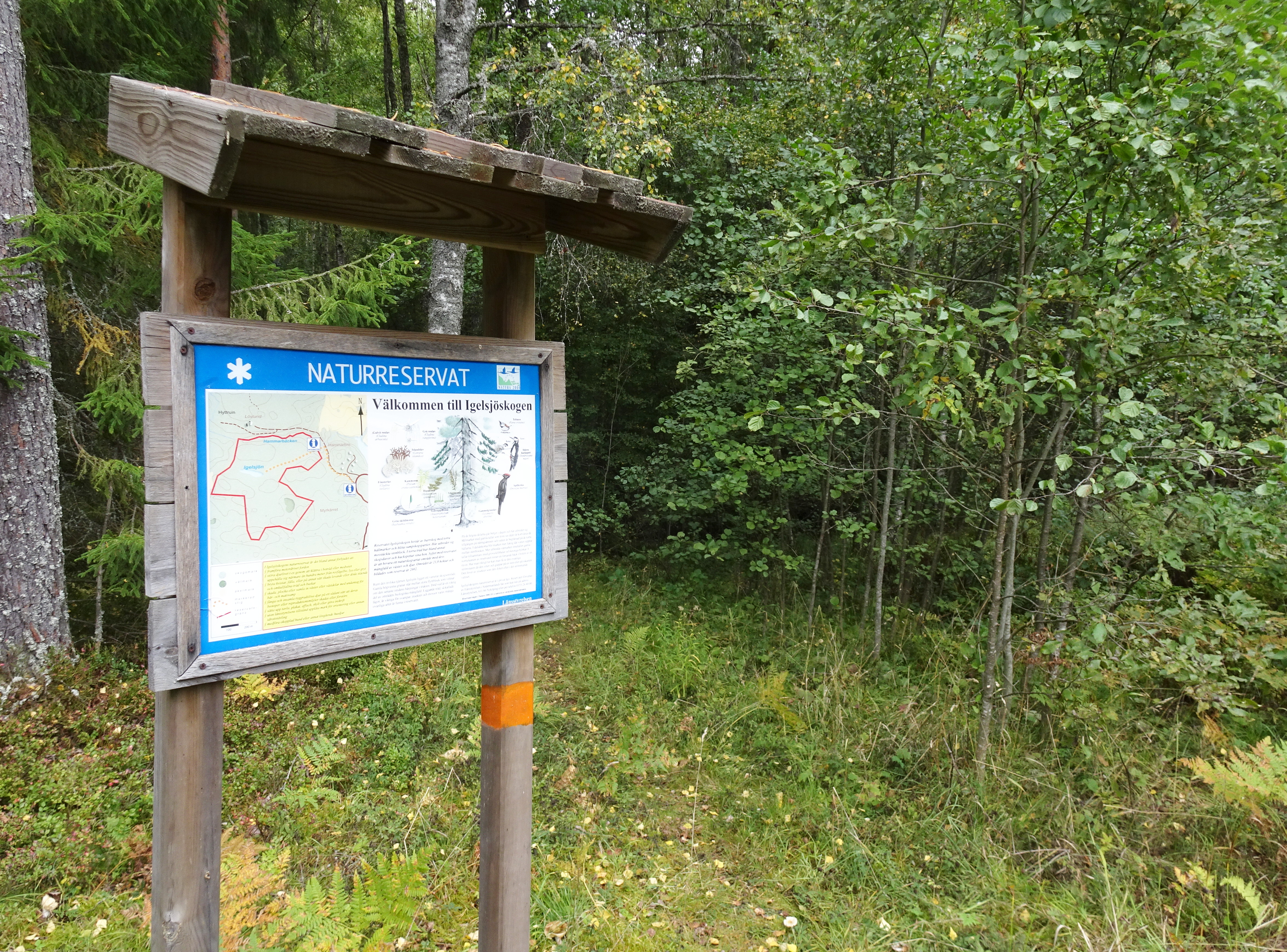 Igelsjöskogens naturreservat